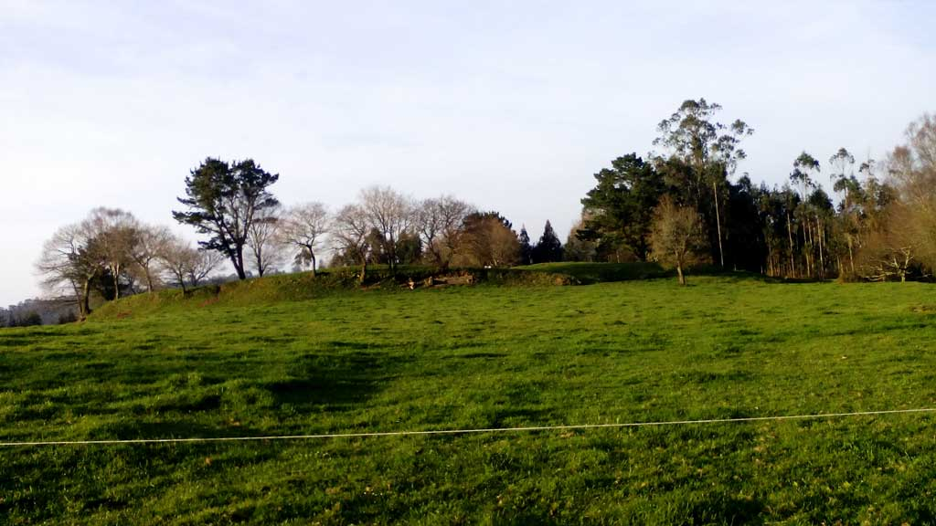 Vista do Castro do Valló.